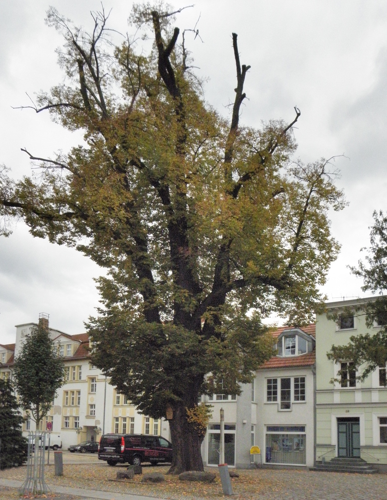 Eberswalde Schicklerstraße: Naturdenkmal Winterlinde (Tilia cordata). Auch "Wunderlinde" oder "Marktlinde" genannt. Steht dort, wo in der Eberswalder Vorstadt früher ein Marktplatz vorhanden war. Vermutlich 250 Jahre alt. Höhe rund 25 m; Umfang in 1,30 m Höhe 3,25 m. (Angaben nach der dort von der Stadtverwaltung angebrachten Erklärungstafel.)